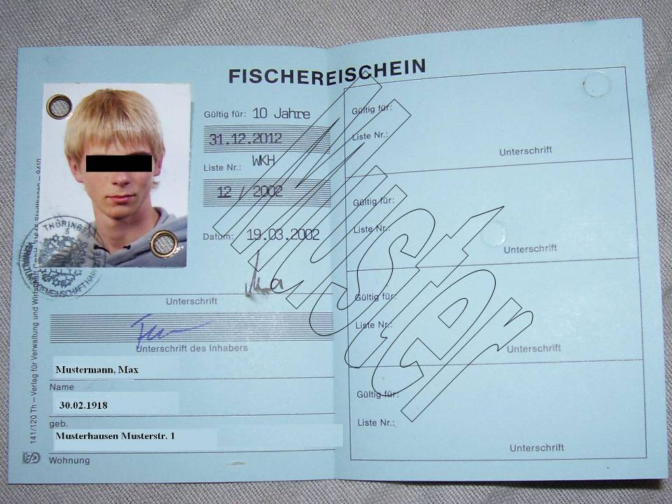 Dieses Bild zeigt einen Fischereischein, wie er in Deutschland zur Ausübung der Fischerei benötigt wird.